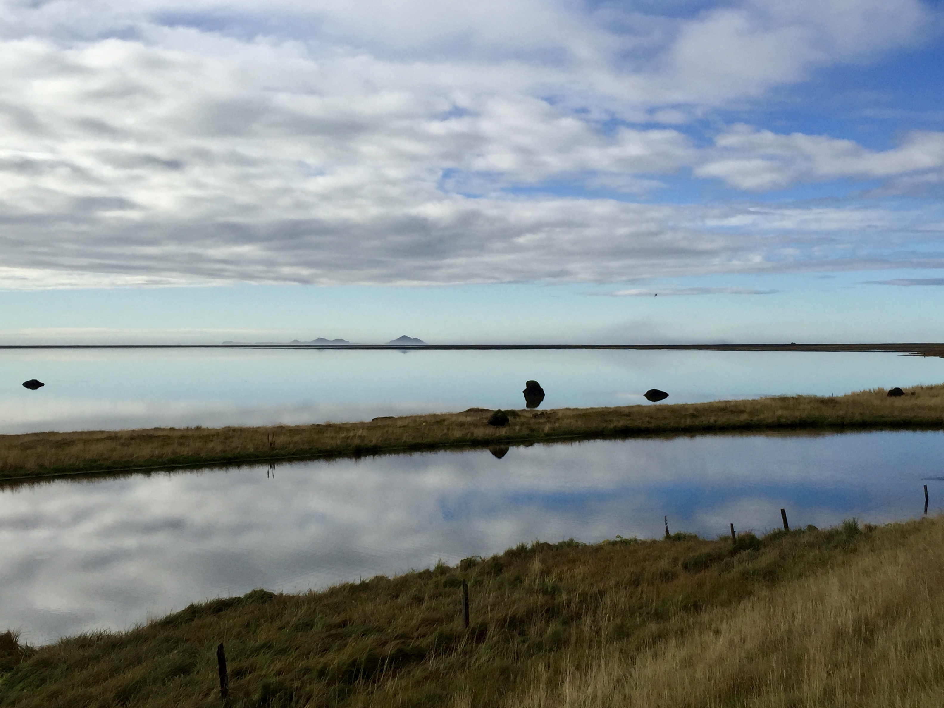 Foto von den Westmännerinseln im September 2017.